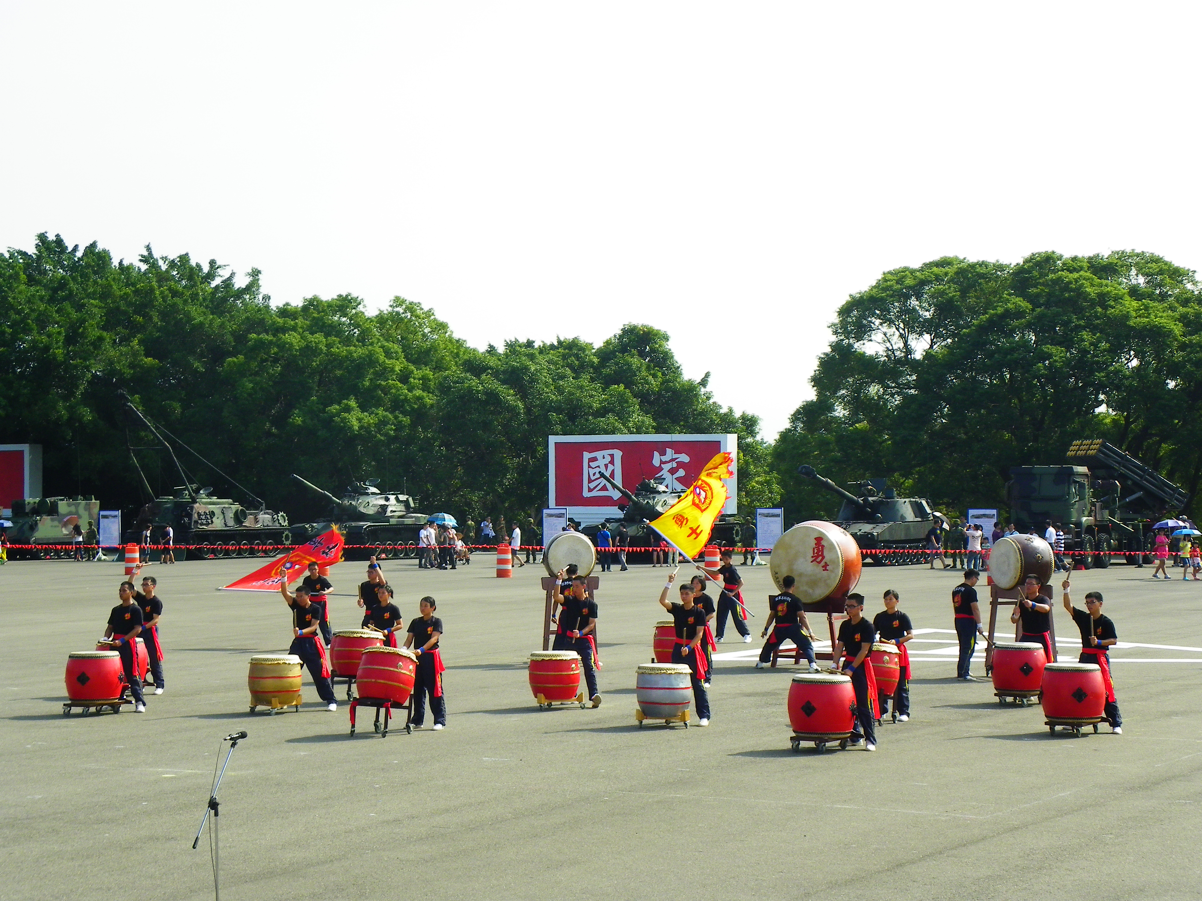 中文（台灣）: 演奏中的陸專戰鼓隊。